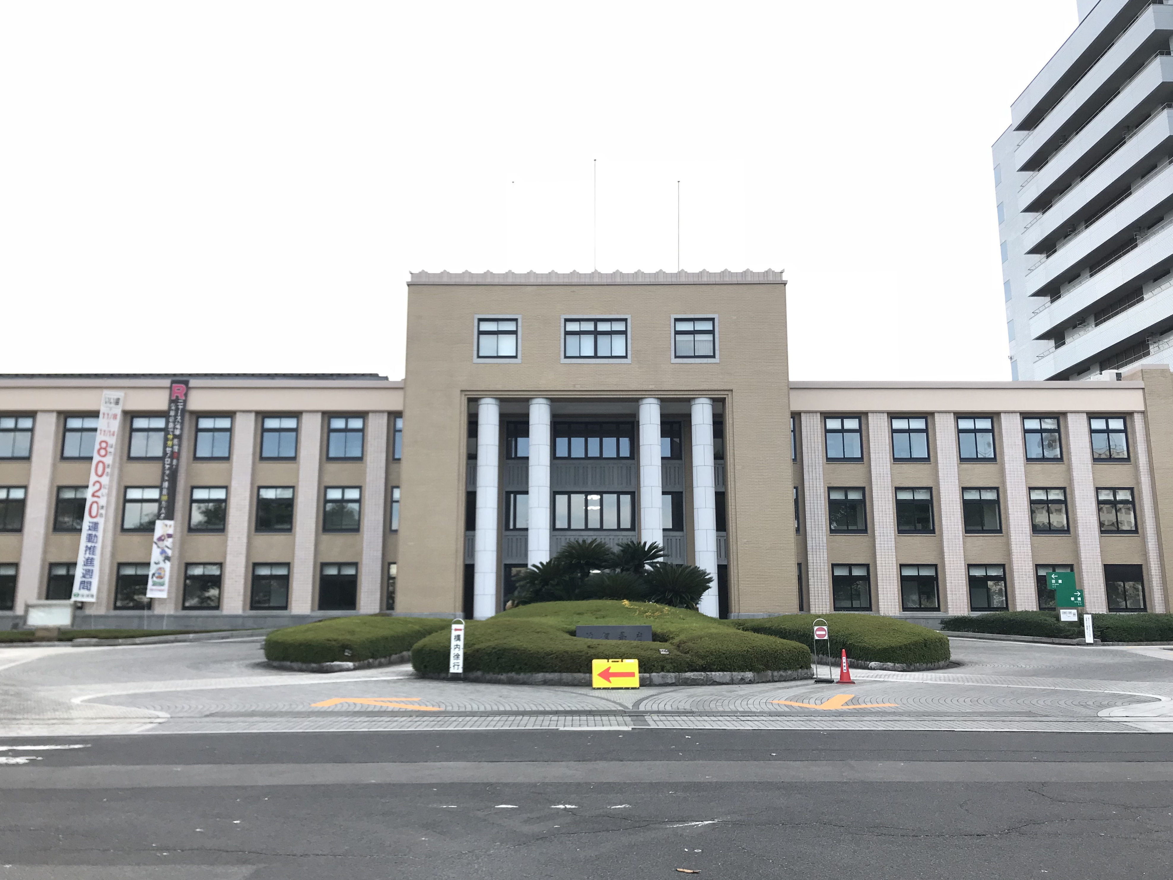 佐賀県庁本館